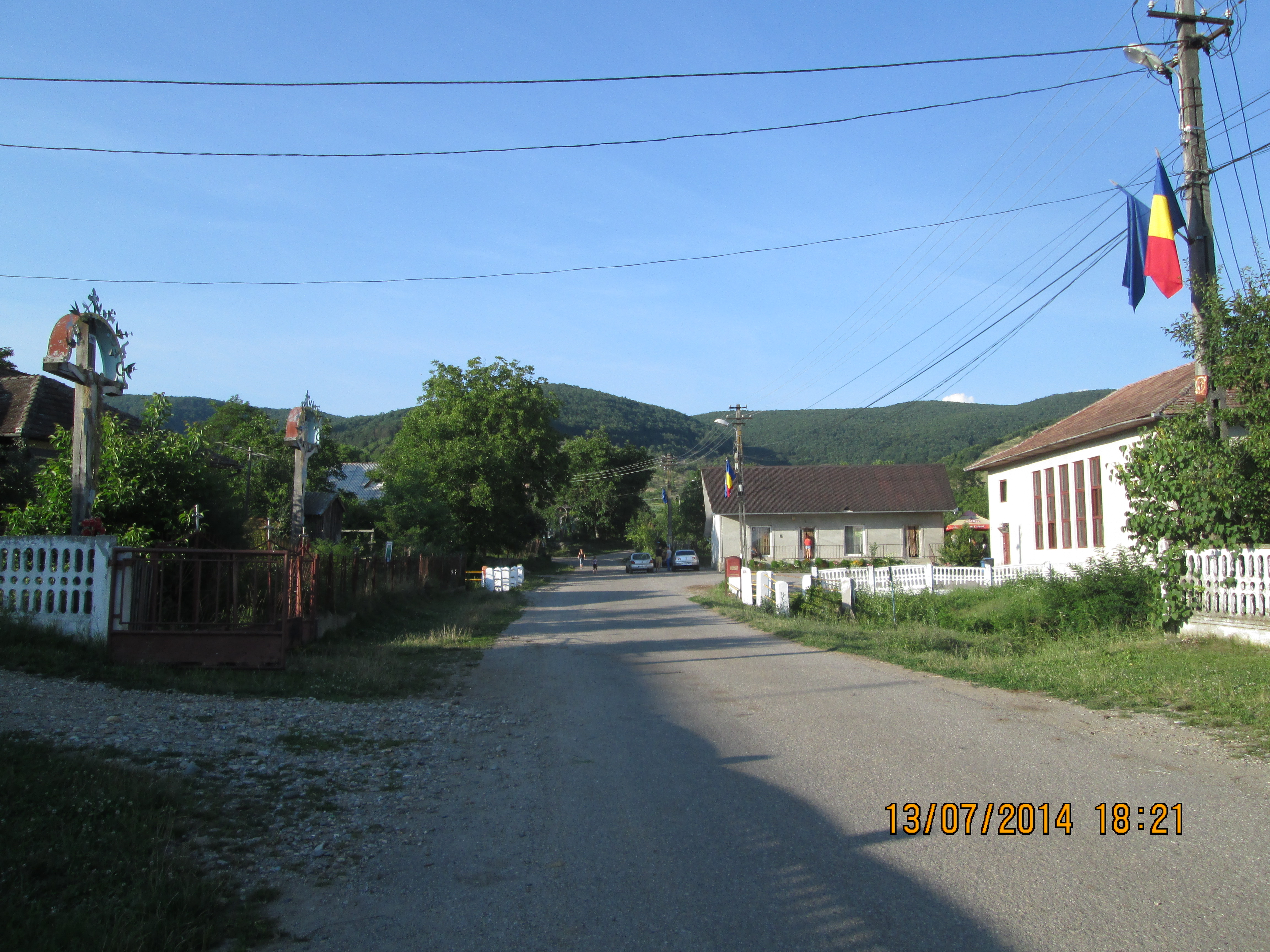 Salisca village center